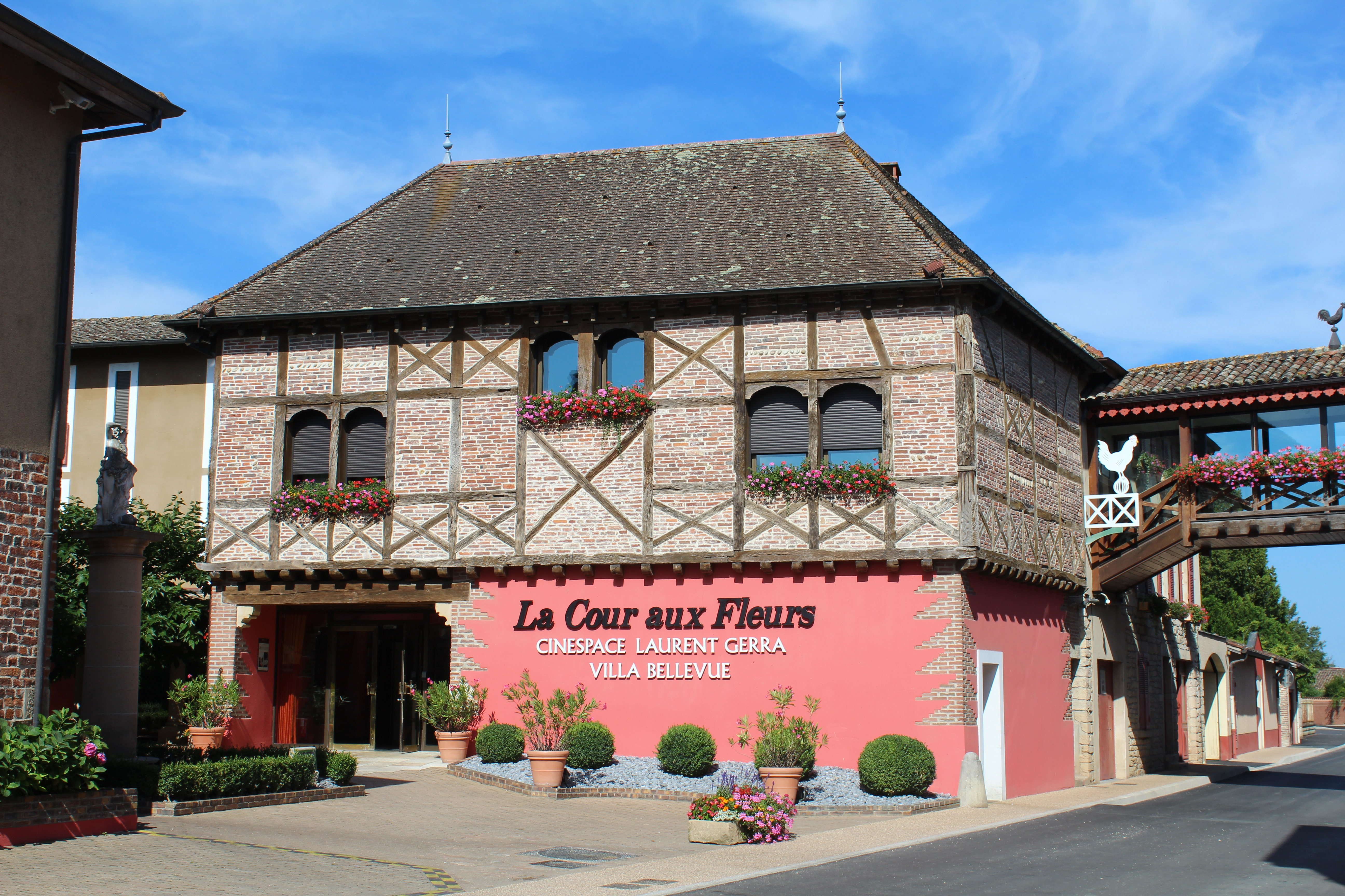 La Cour aux Fleurs (Cinespace Laurent Gerra - Villa Bellevue) à Vonnas.